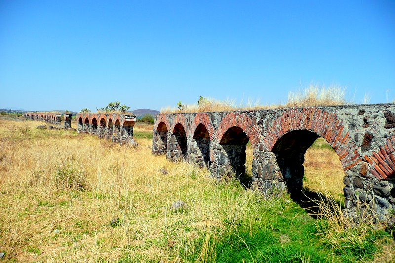 Acueducto de Ameca